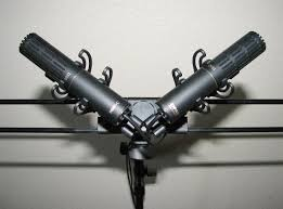 Micros colocados con la disposicion de la Tecnica estereofonica ORTF